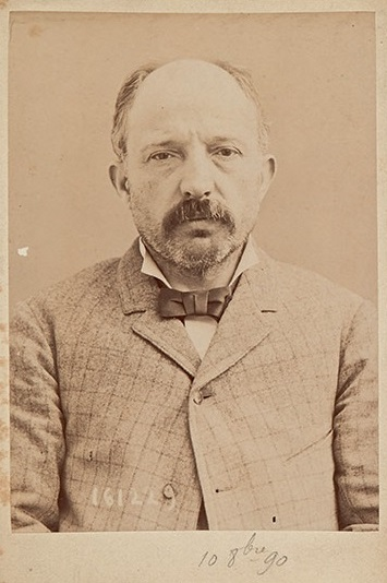 Michel Eyraud, assassin de l’huissier Gouffé.